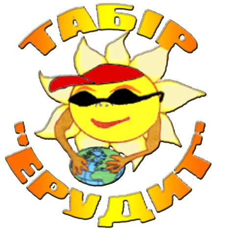 Емблема дитячого оздоровчого табору «Ерудит» (2001-2011 рр.)